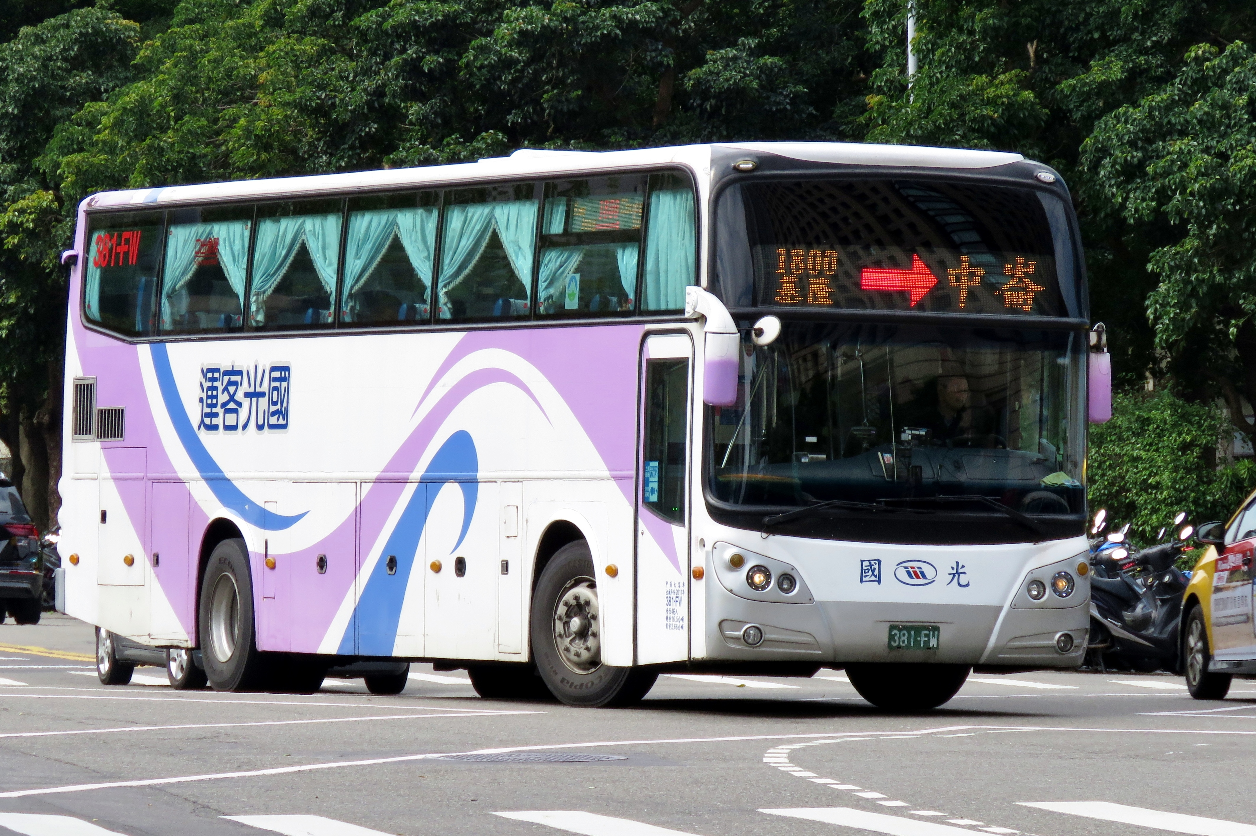 2012 Daewoo FX116 381-FW 1800 基隆→中崙